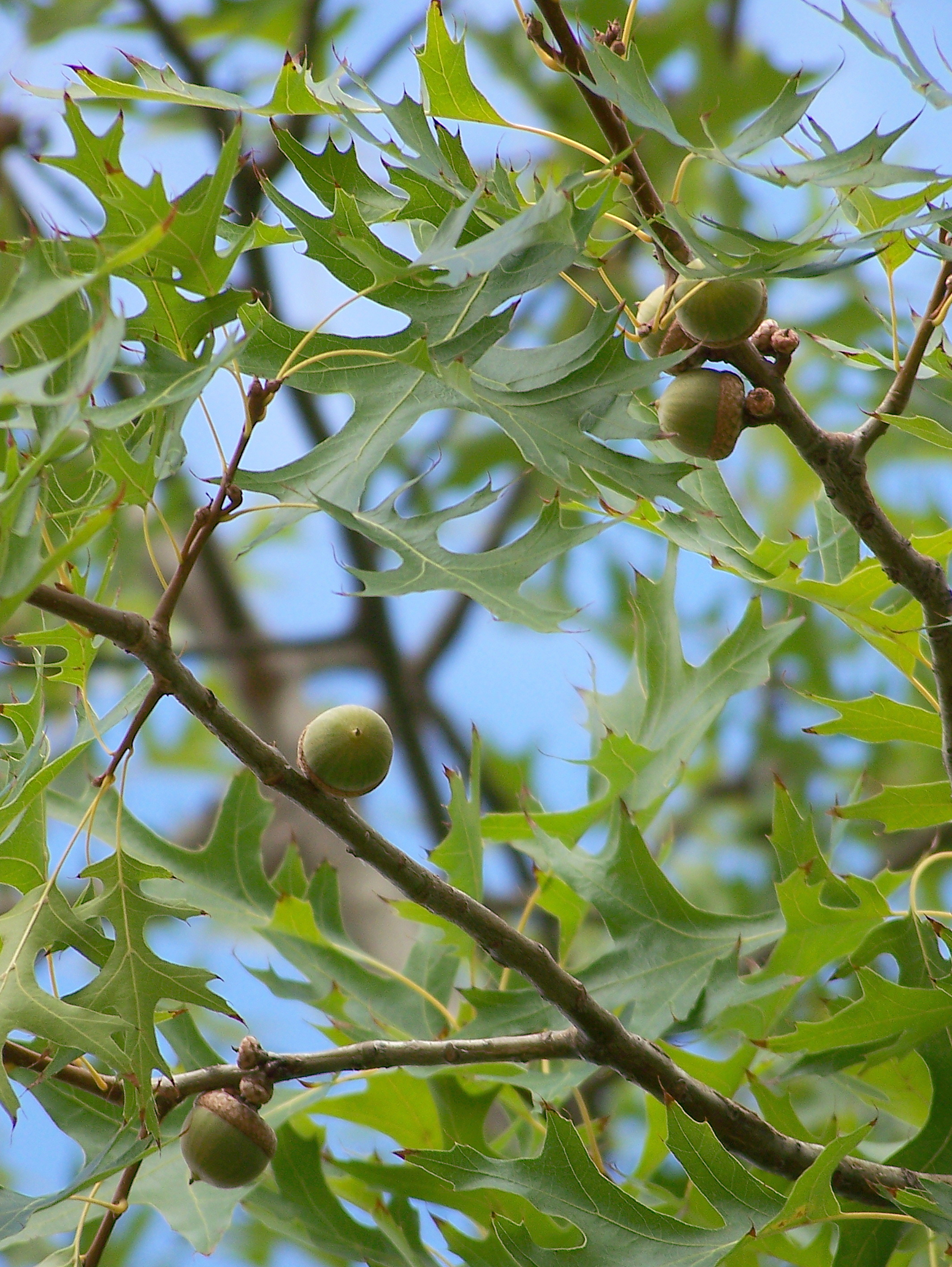 Quercus palustris (Roble de los Pantanos) : Bellotas in situ - Parque del Buen Retiro, Madrid (España).